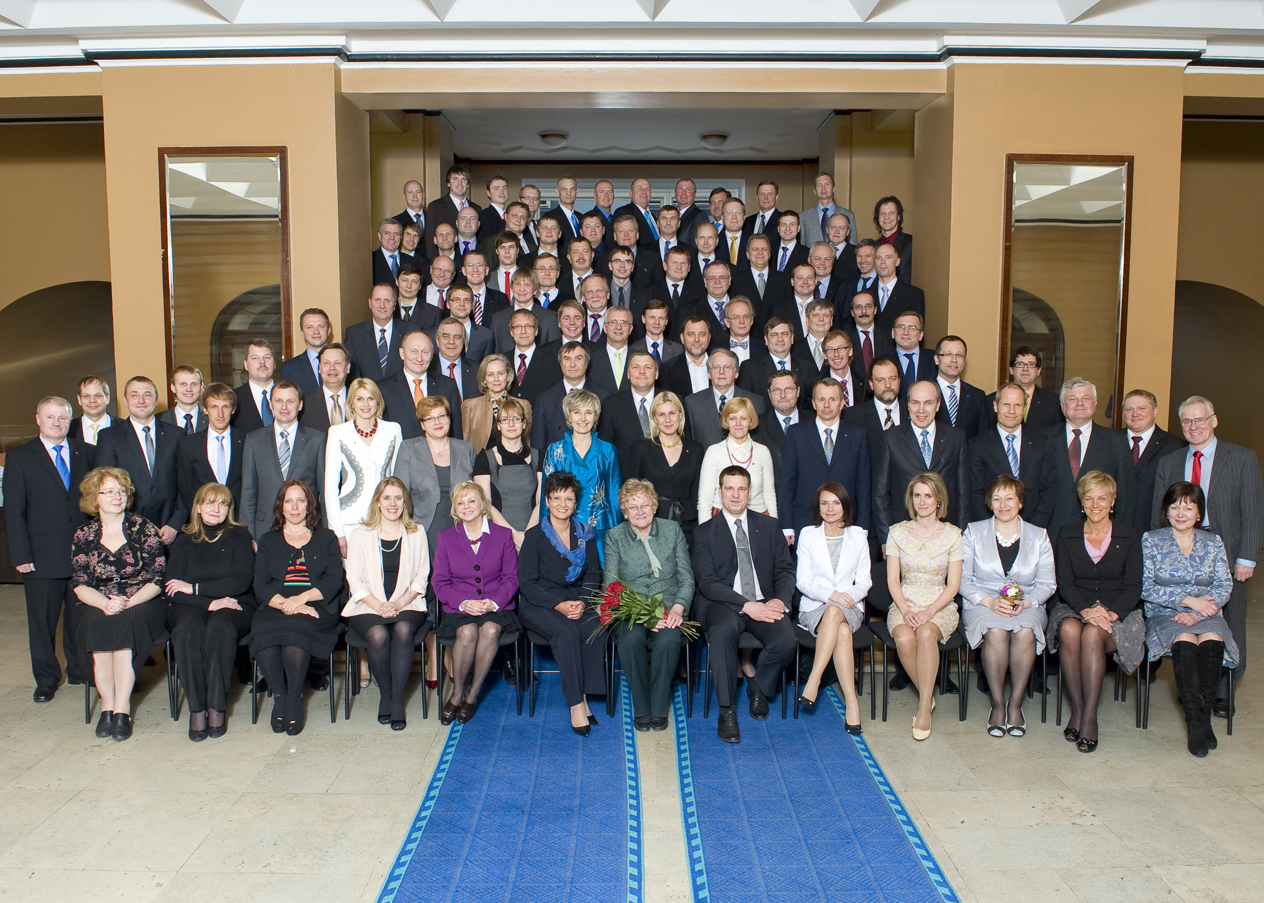 Riigikogu XII koosseisu avapilt.